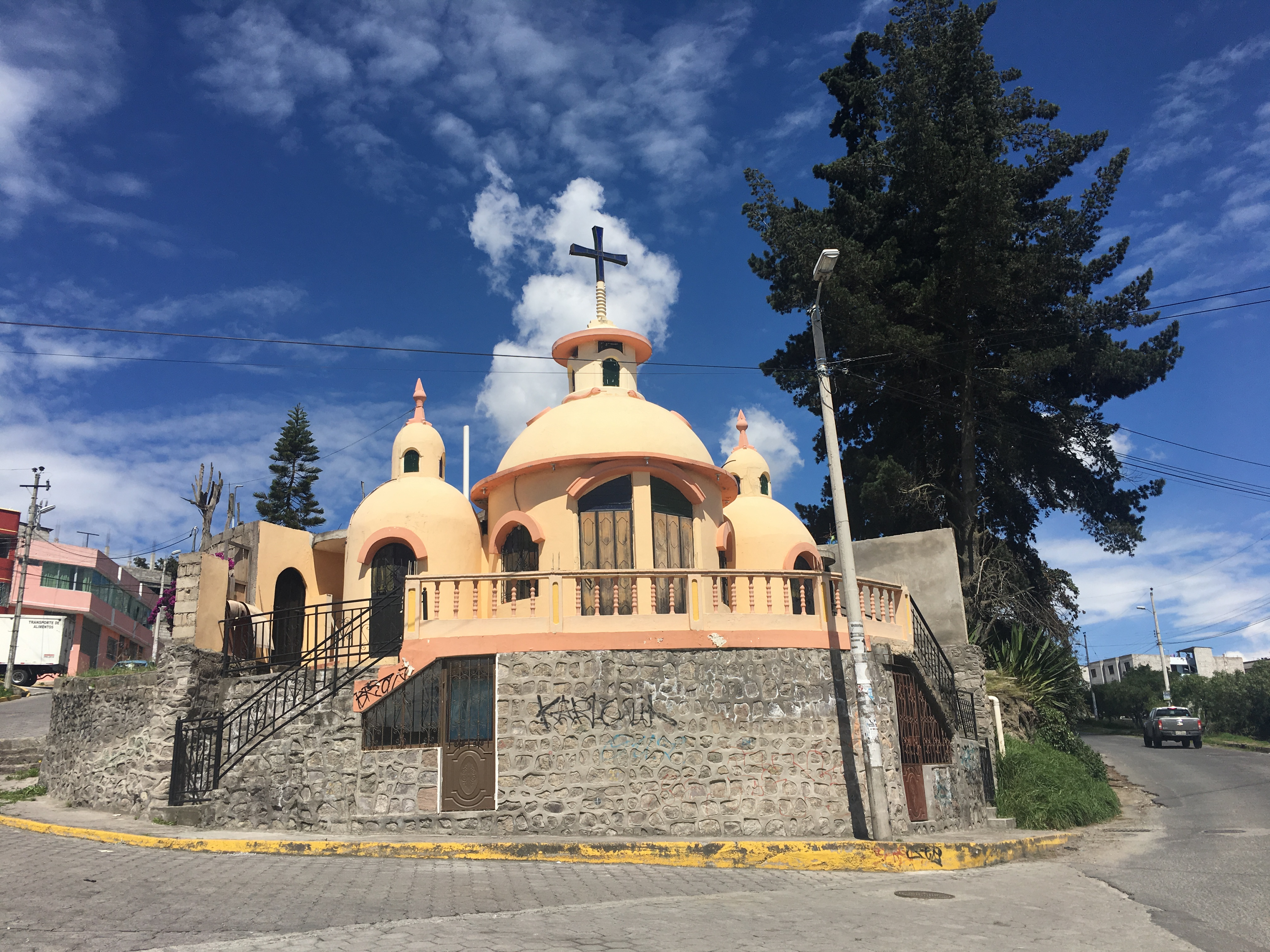 Una imagen actual del simborio de la virgen del cisne